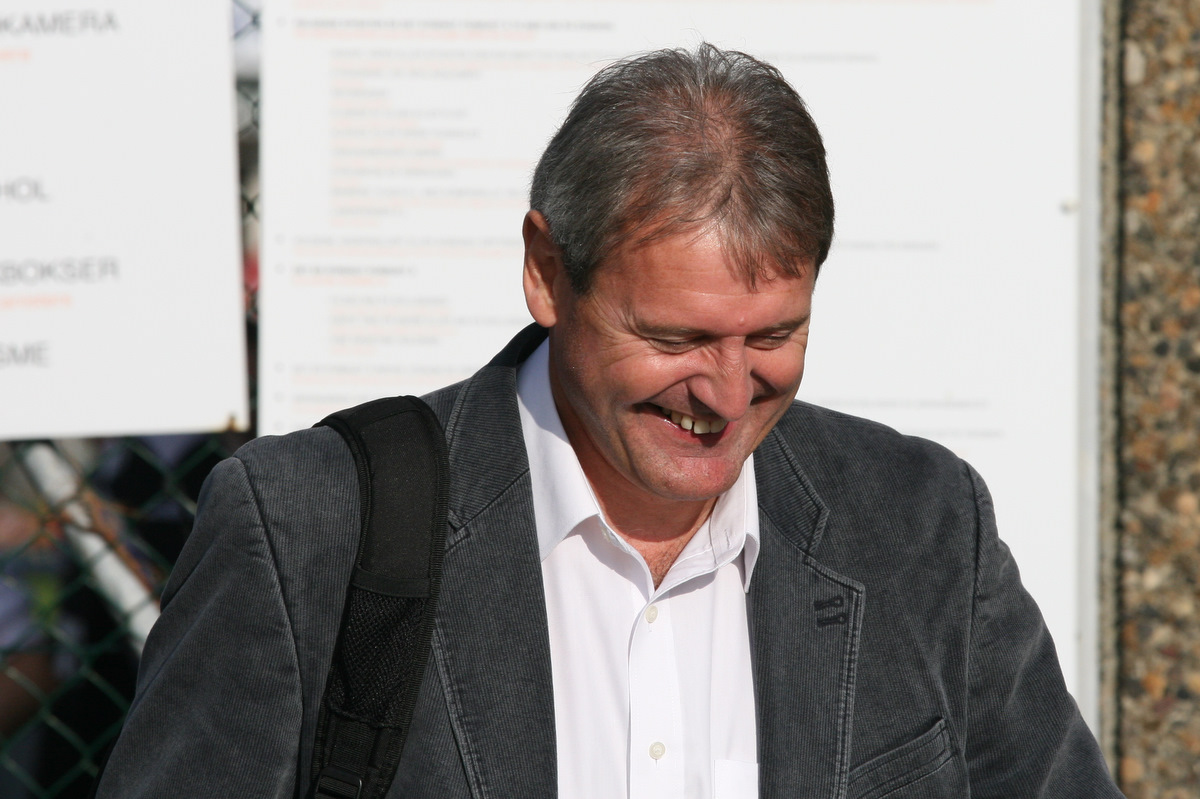 Arne Dokken, Sandefjord